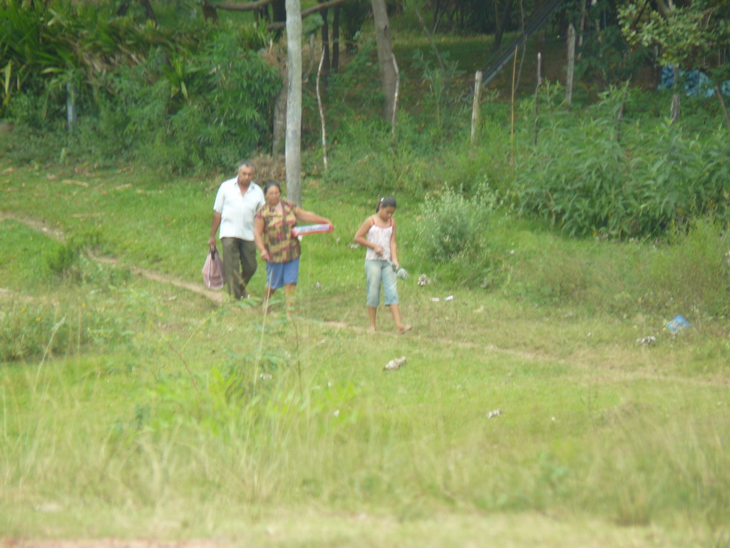 Pirayu